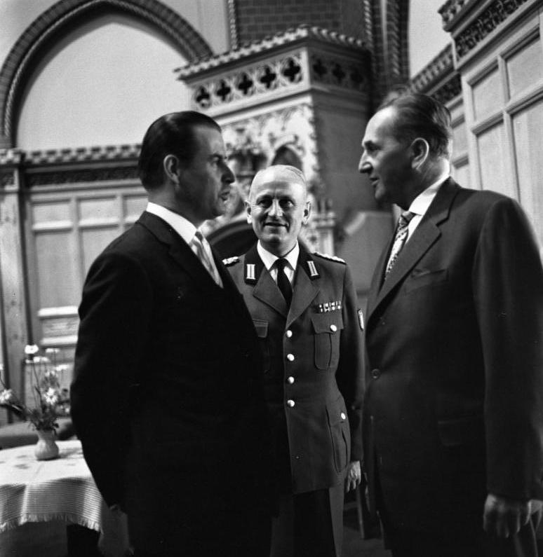 10 jähriges Bestehen des BGS: Empfang des Bundesinnenministers (Schröder) im Rathaussaal Lübeck